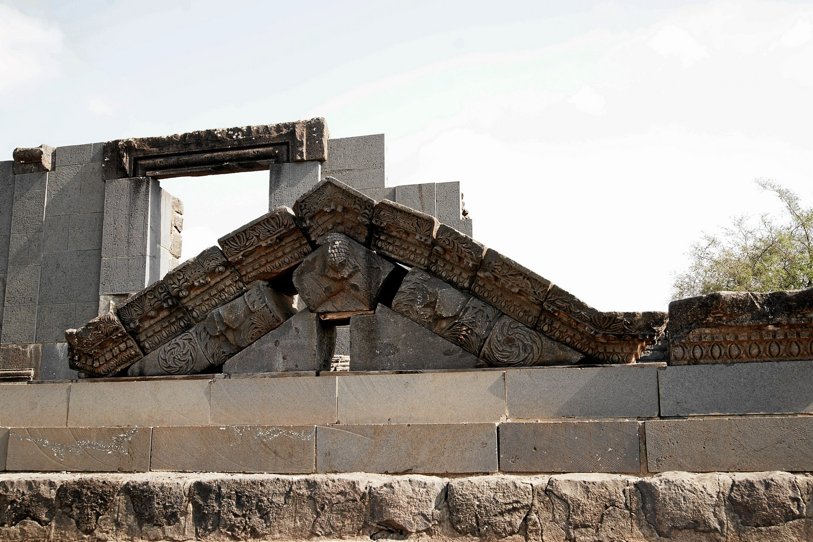 Korazim: Giebel der antiken Synagoge